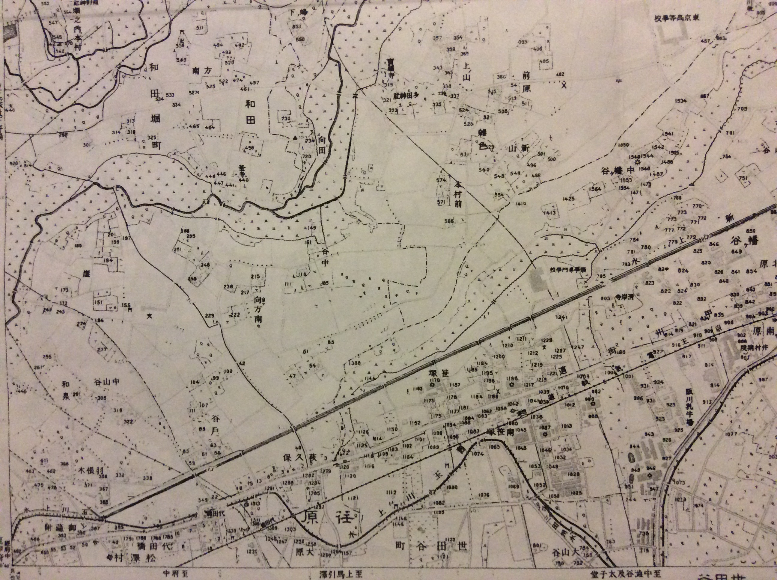 大正14年、1万分1地形図（2014年12月24日撮影）